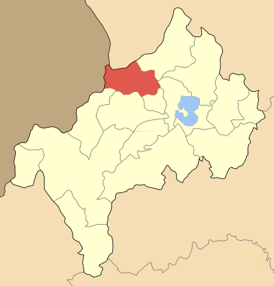 Община Кастраки на картата на Ном Костур, Гърция. Locator map of Kastrakiou community (Κοινότητα Καστρακίου) at Kastoria perfecture, Greece).